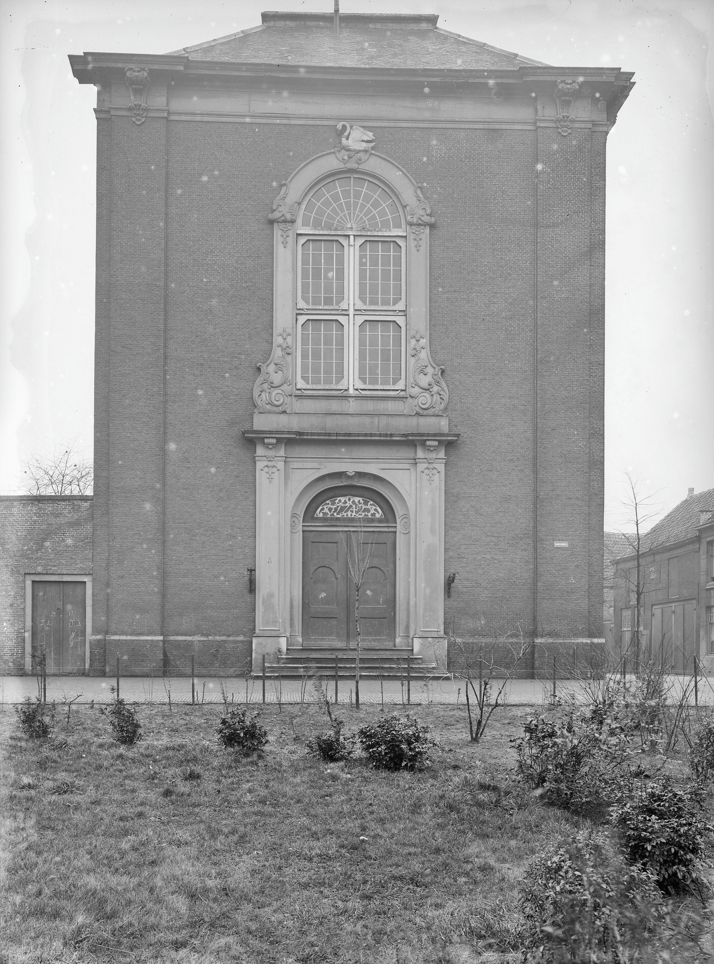 Lutherse Kerk: voorgevel (opmerking: Fotonummer 10297)